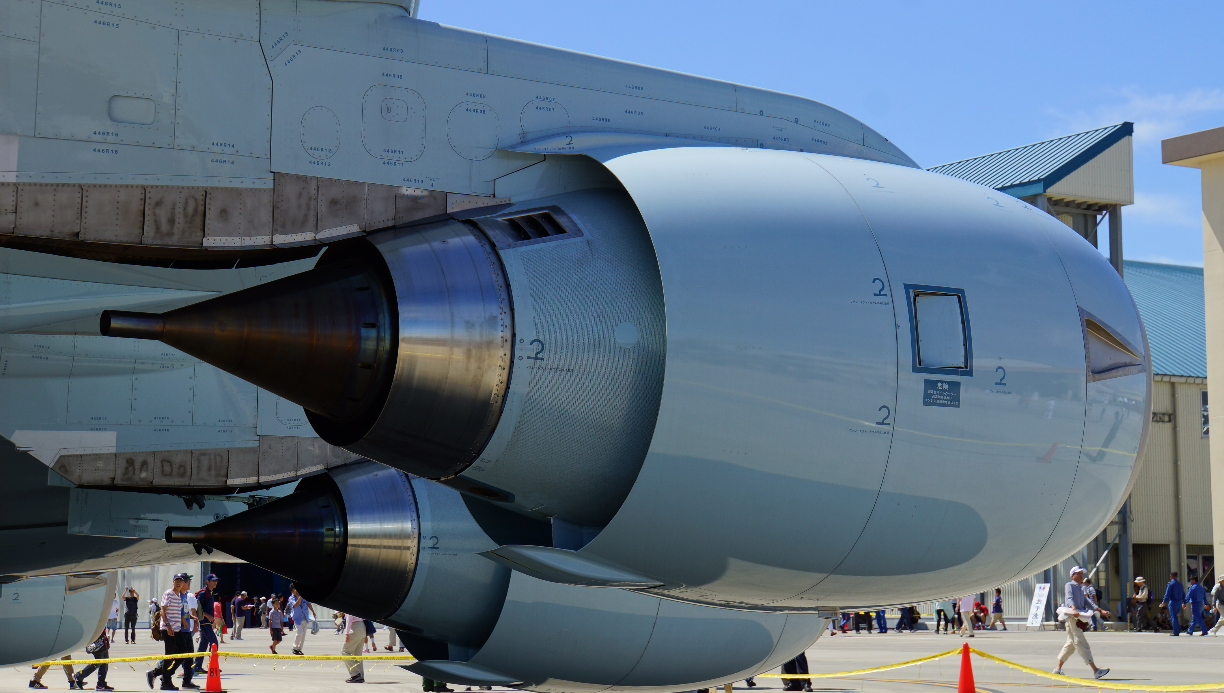 海上自衛隊 P-1哨戒機（5506号機） 右主翼部F7-10ターボファンエンジン 後方より。 14年9月14日 岩国航空基地にて。